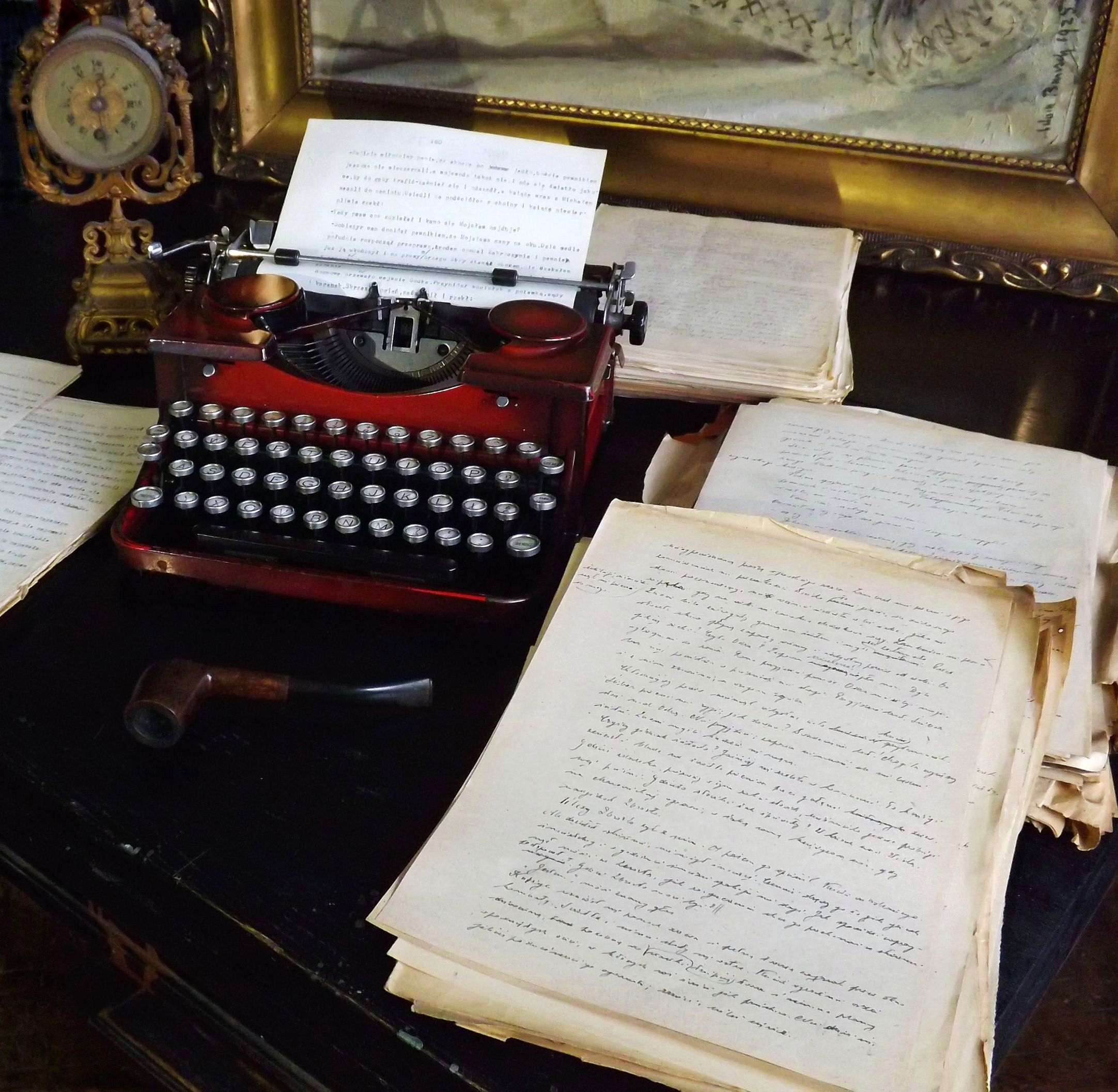 Biurko pisarza Karola Bunscha w jego domu w Krakowie